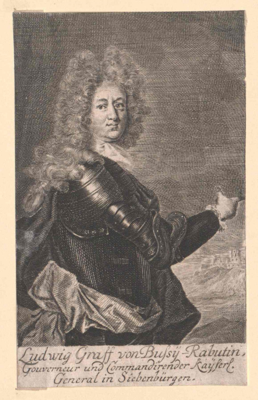 Jean Louis Rabutin de Bussy (1642 – 1717), francia származású arisztokrata, német-római császári hadvezér, Rákóczi-szabadságharc idején lovassági tábornoki rangban az erdélyi császári haderő parancsnoka.